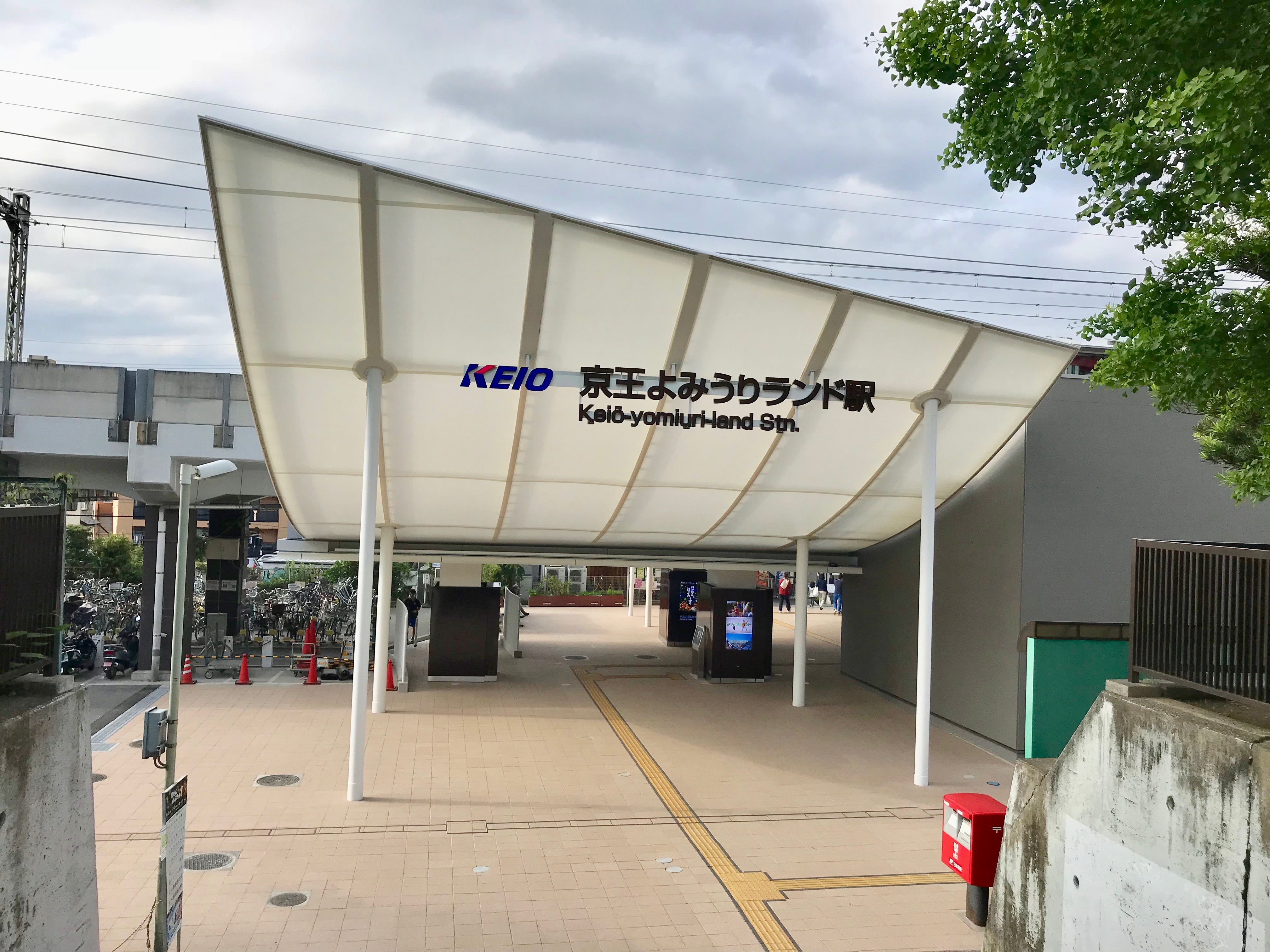 よみうりランド側から見たリニューアル工事完了後の駅の様子